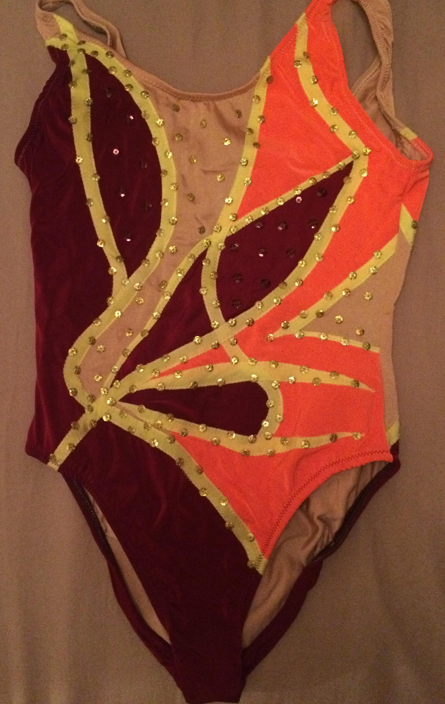 Différents motifs dessinés par des tissus de diverses couleurs ainsi que des paillettes